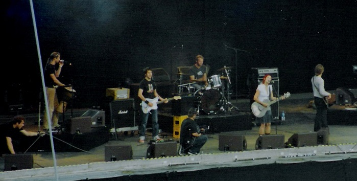 Diane Weigmann at Stars For Free-Festival (Kindl-Bühne Berlin-Wuhlheide).